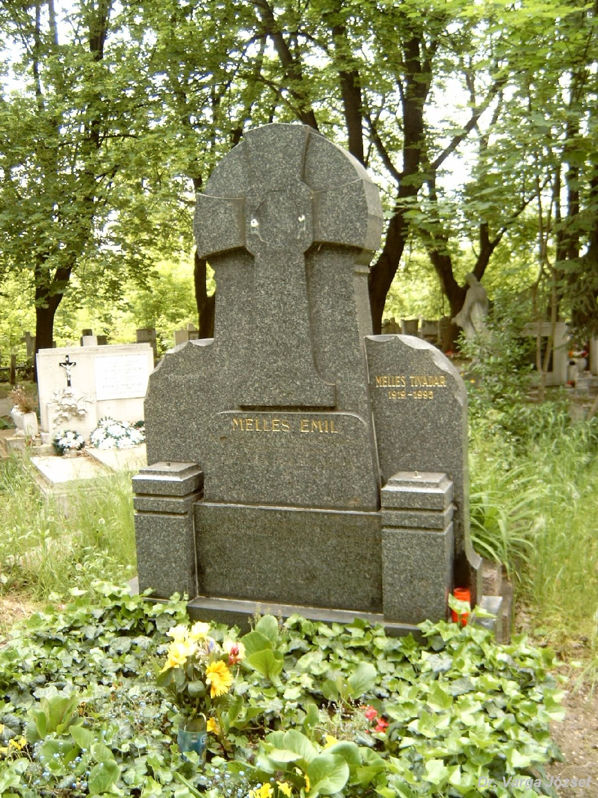 Melles Emil (Napkor, Szabolcs vm., 1857. március 16.-Budapest, 1932. március 19.) görög katolikus áldozó-pap, egyházi író sírja Budapesten. Új köztemető: 138/6-1-3/4.